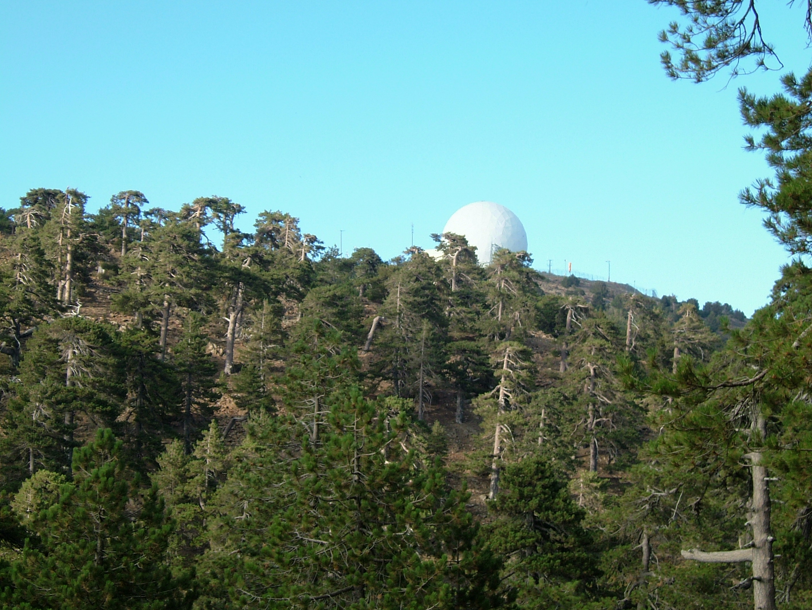 Άποψη της κορυφής της Χιονίστρας (1951 μ.) Άδεια χρήσης Το παραπάνω αρχείο διανέμεται υπό τις δύο παρακάτω άδειες χρήσης. Μπορείτε να επιλέξετε την άδεια της προτίμησής σας.